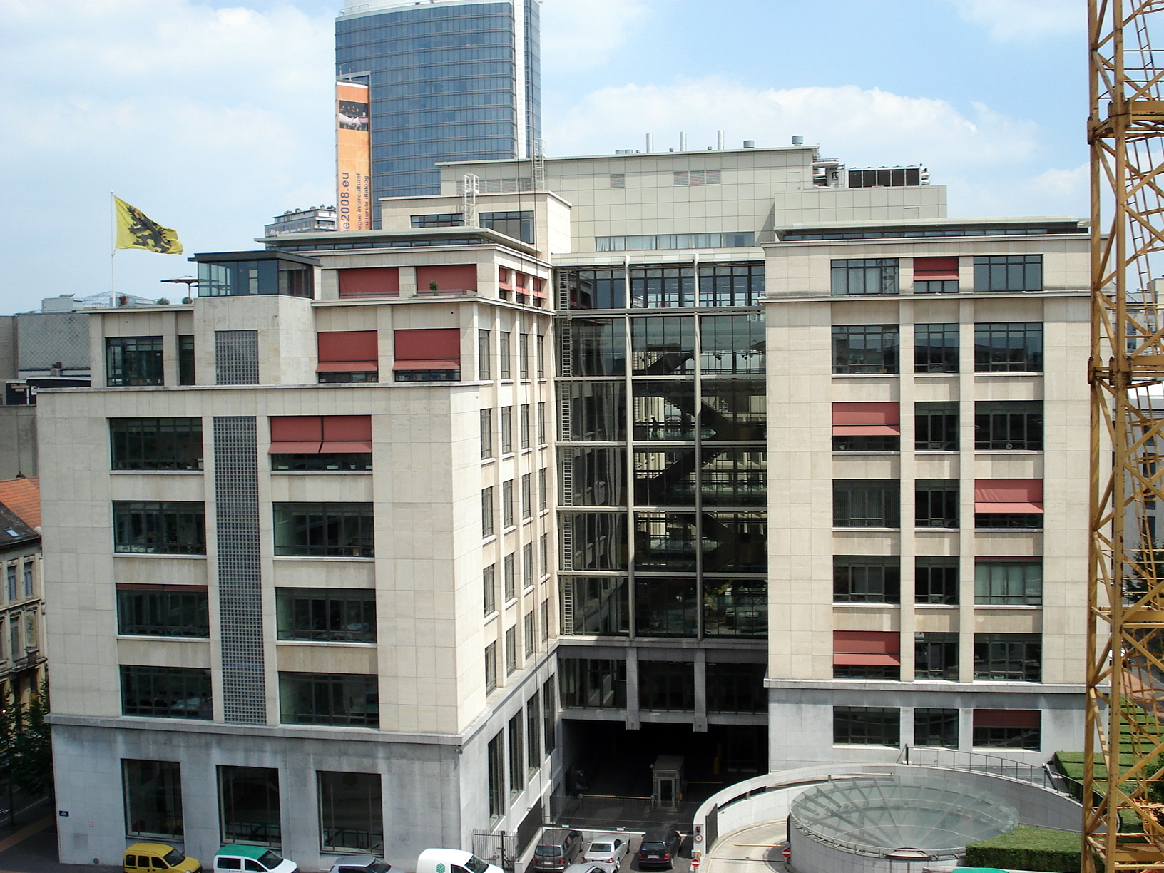 Bruxelles (Belgique), rue de la Presse: Ancien bâtiment des Comptes-Chèques-Postaux, aujourd'hui 'Maison des représentants flamands', hébergeant les services administratifs du Parlement flamand. À l'arrière-plan, la 'tour Madou', sur la place Madou.